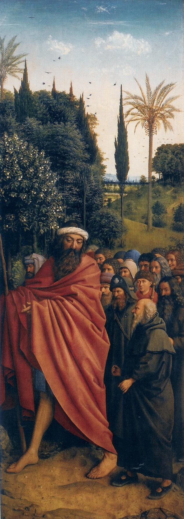 detail: pilgrims